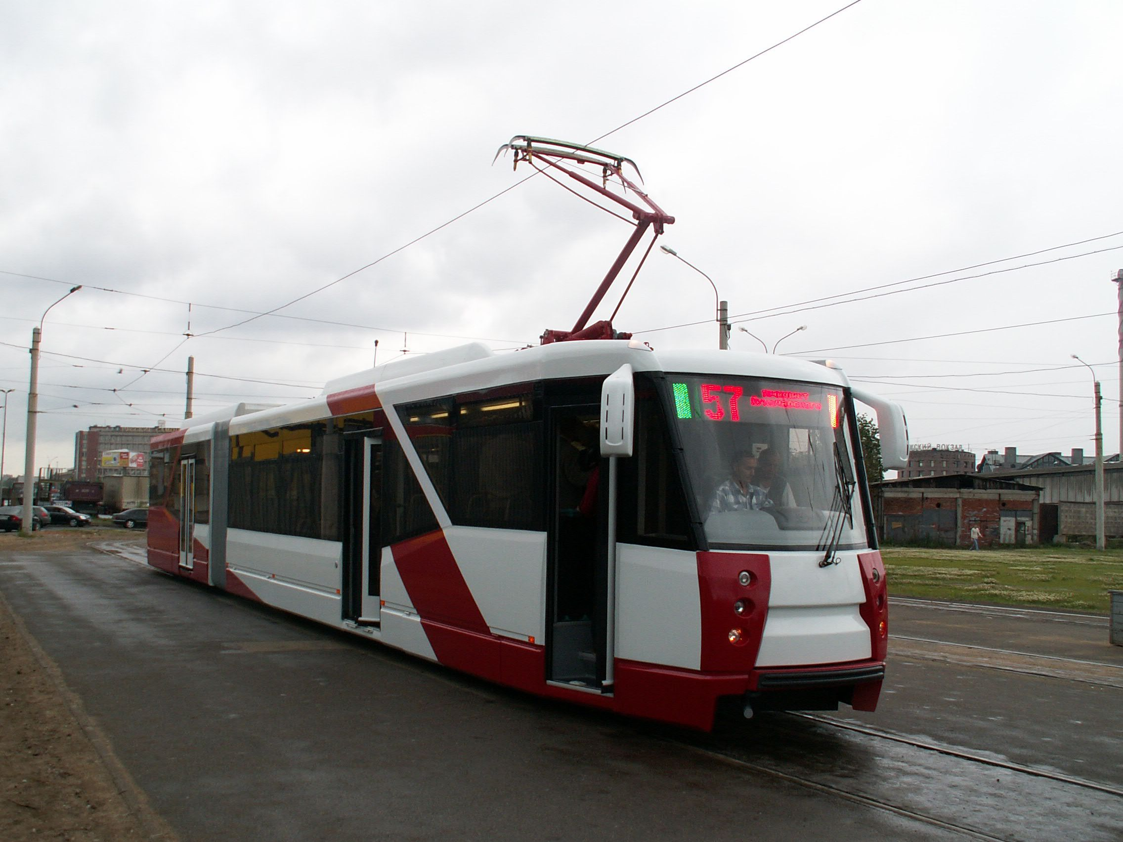 Трамвайный вагон ЛВС-2005 на конечной станции «Ладожский вокзал».